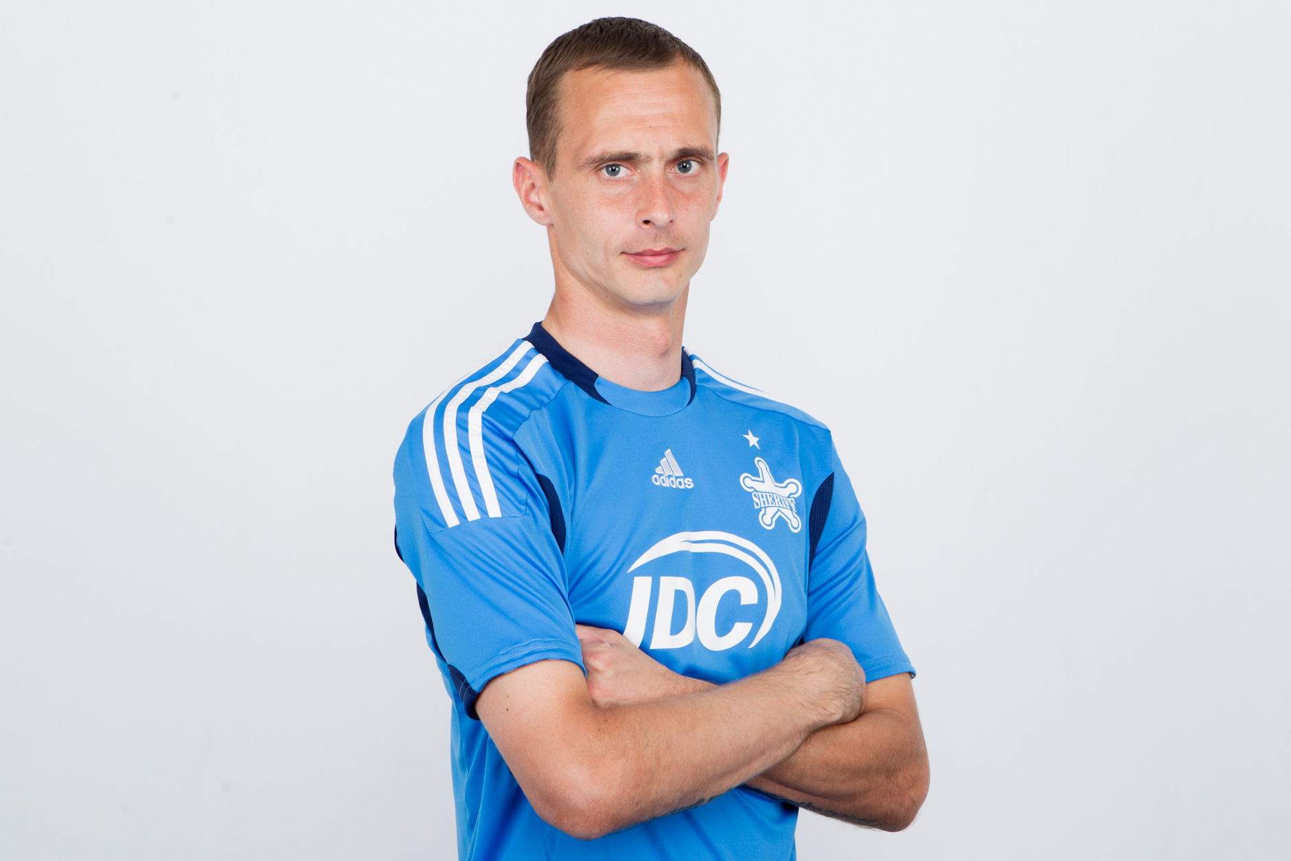 Сергей Пащенко — вратарь и капитан футбольного клуба «Шериф»